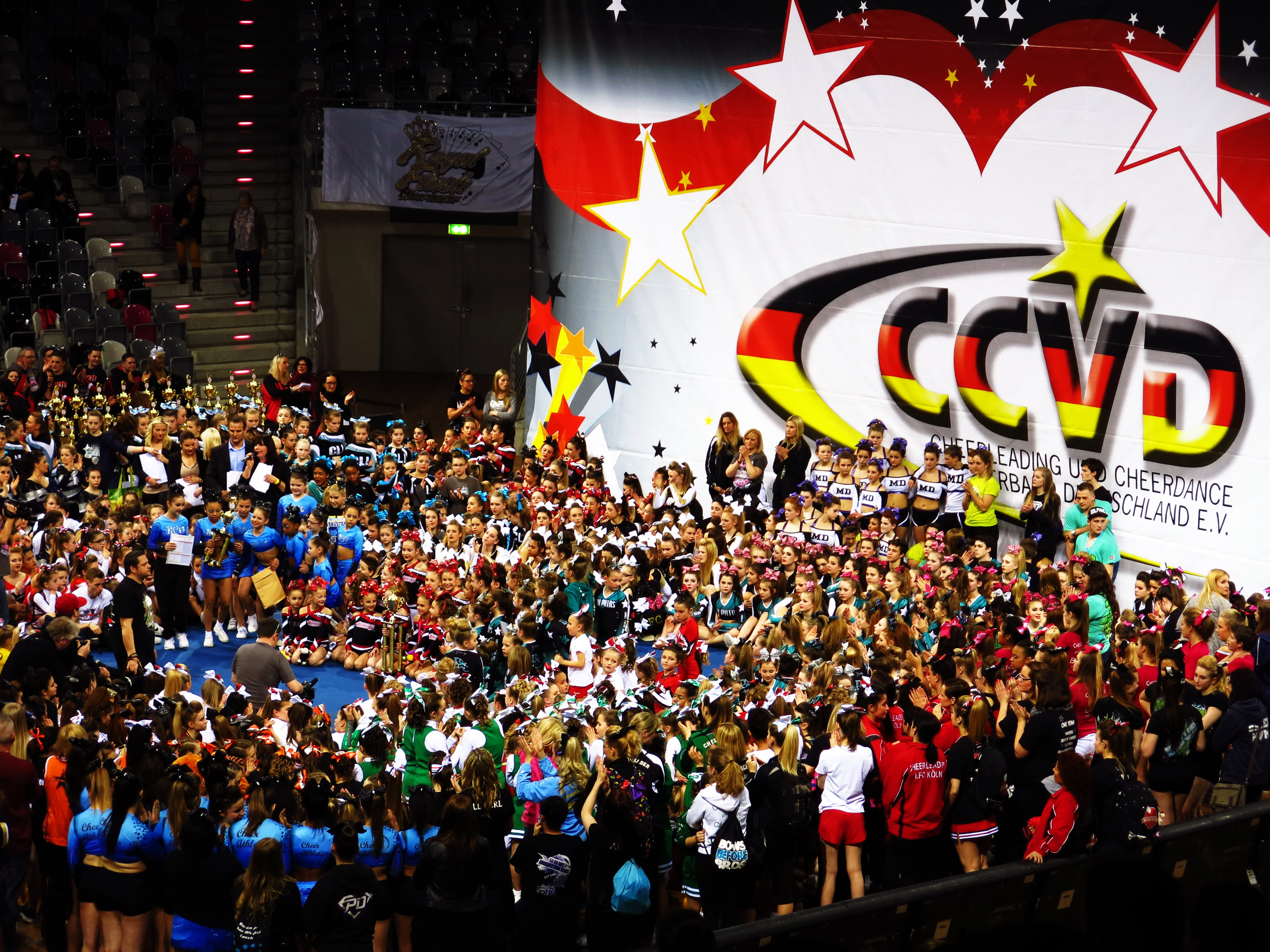 Telekom Dome, Basketsring 1, Bonn. Eine Veranstaltung des Cheerleading- und Cheerdance-Verband Deutschland.